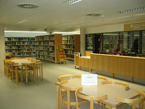 El Centre de Documentació de Medi Ambient (CDMA) és una biblioteca especialitzada de la Generalitat de Catalunya a disposició d’investigadors, estudiosos i persones interessades en les qüestions ambientals. Va començar a funcionar el 1991